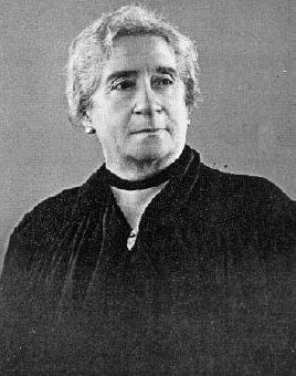 Doña Manuela Funes de Cullen. Nació el 5 de mayo de 1862 y falleció el 9 de agosto de 1940. El día que cumplió 43 años decidió apoyar, en su propia casa, a esos niños que querían fundar un club de fútbol. Y nació Colón.